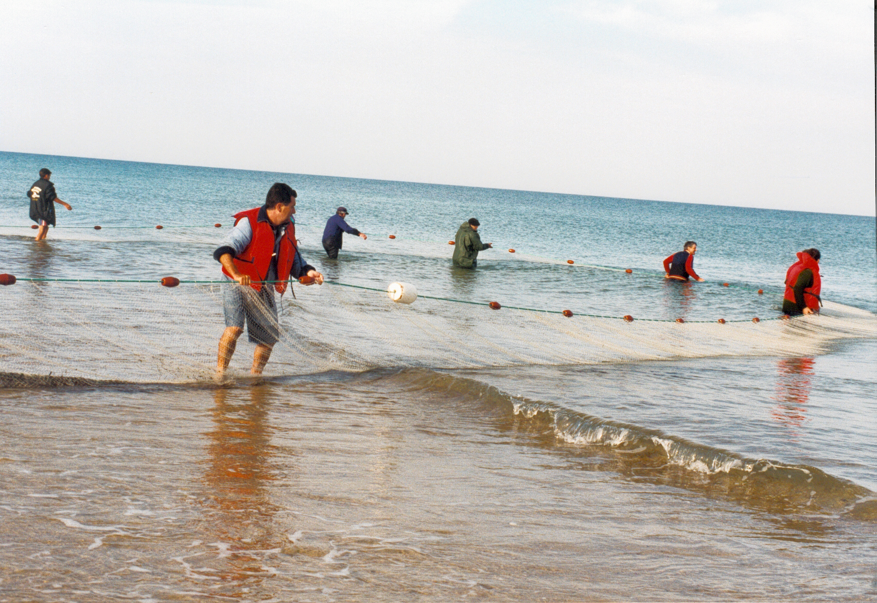 Pêche à la pinasse ; plage du Cap de l'Homy, Lit-et-Mixe, France